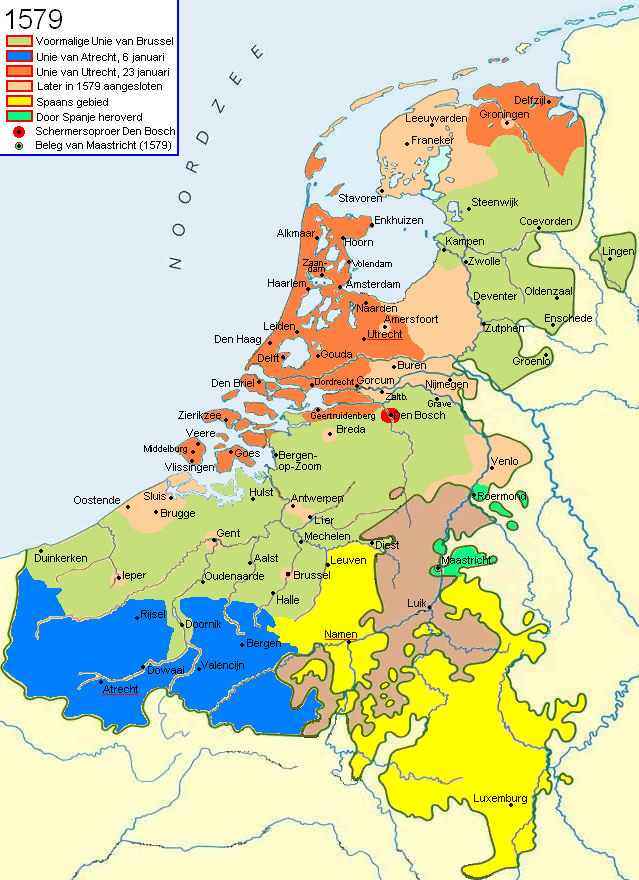 Krijgsbewegingen in de Tachtigjarige Oorlog. 1579: Unies van Atrecht en Utrecht, het Schermersoproer en het Beleg van Maastricht.